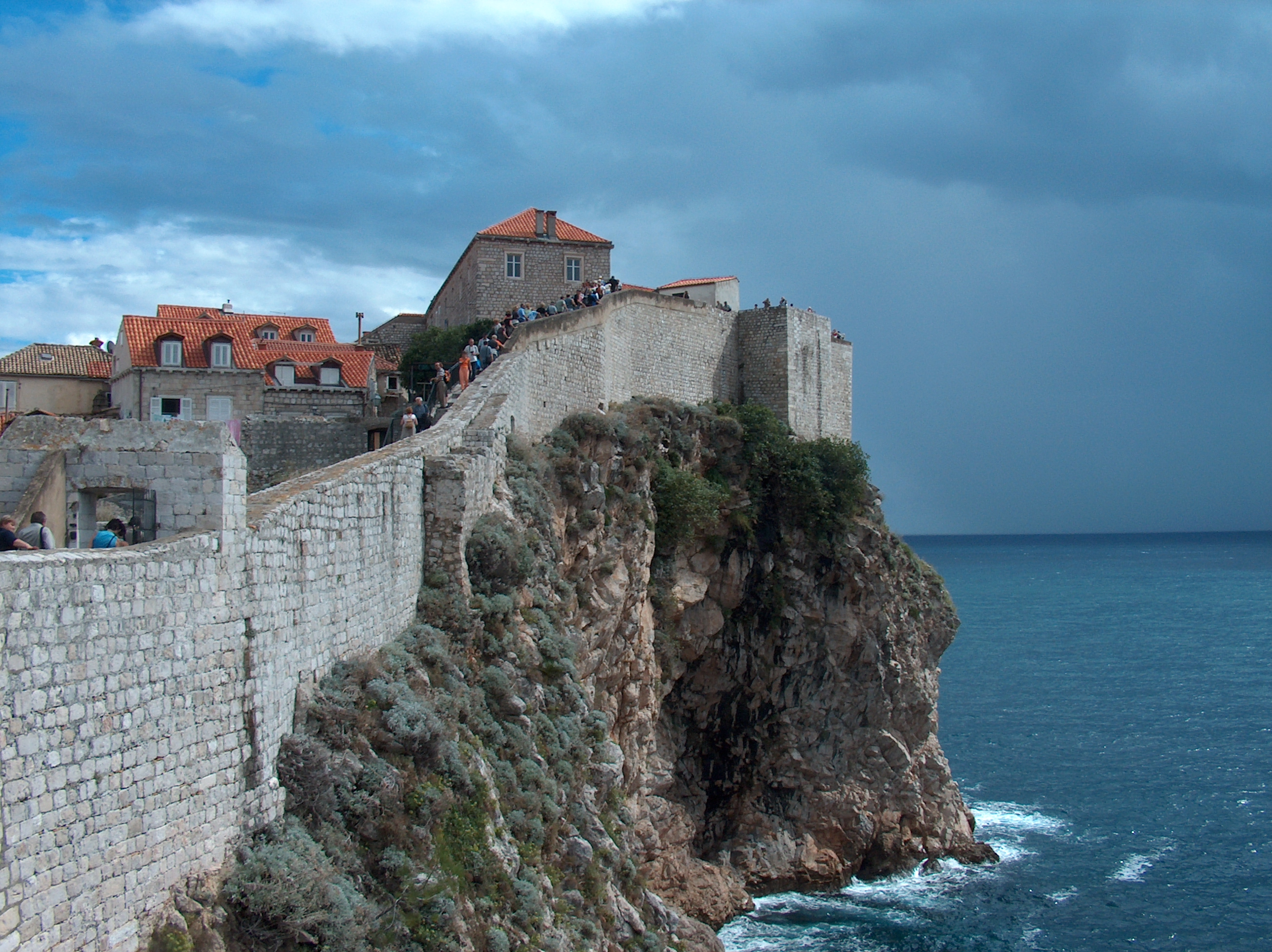 Widok na mury miejskie Dubrownika